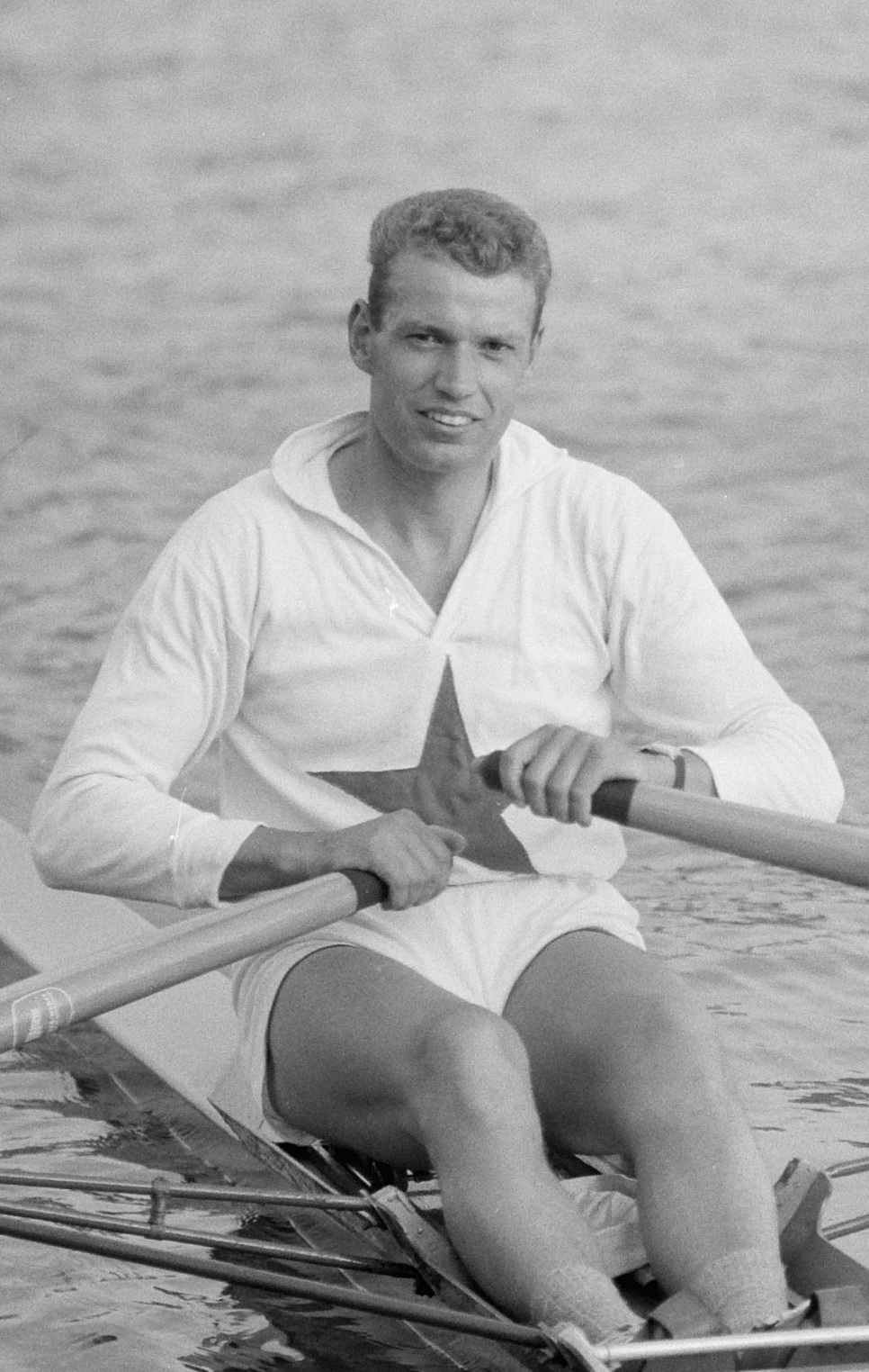 Nationale kampioenschappen roeien op de Bosbaan voor heren Rob Groen